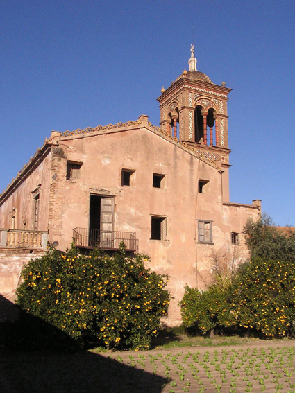 Fachada este del Palauet Nolla, donde se aprecia gran parte de las ventanas originales del edificio